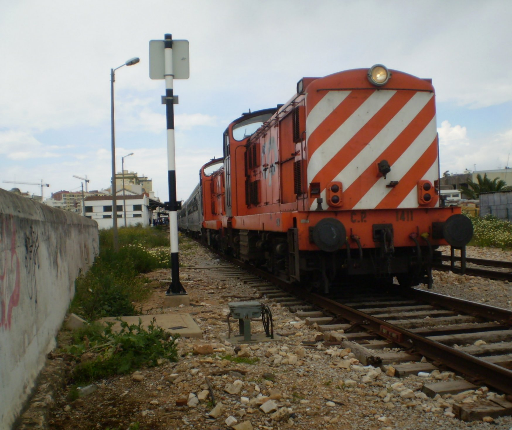 1400 series locomotive of CP - Comboios de Portugal